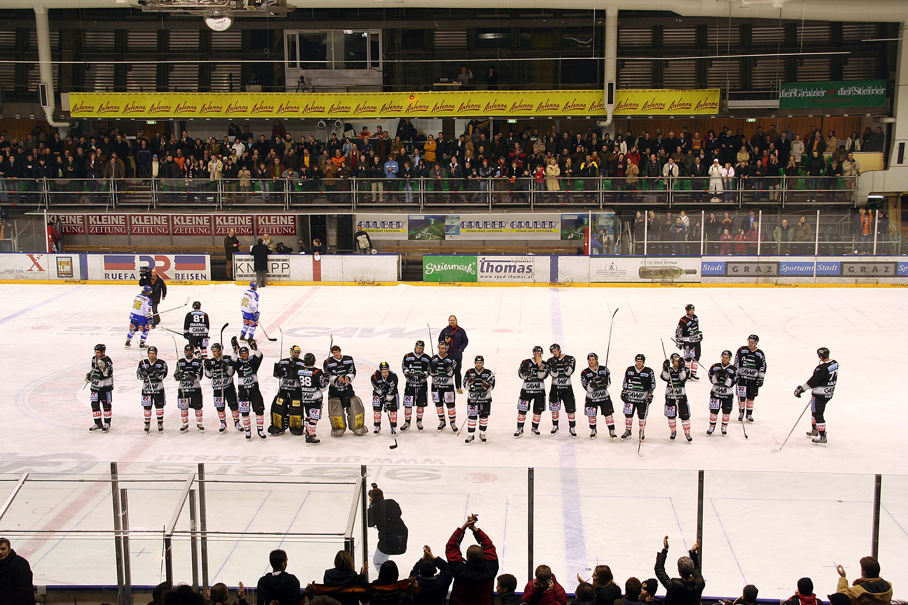 Spieler der Graz 99ers bei der Verabschiedng (Eisstadion Graz-Liebenau)